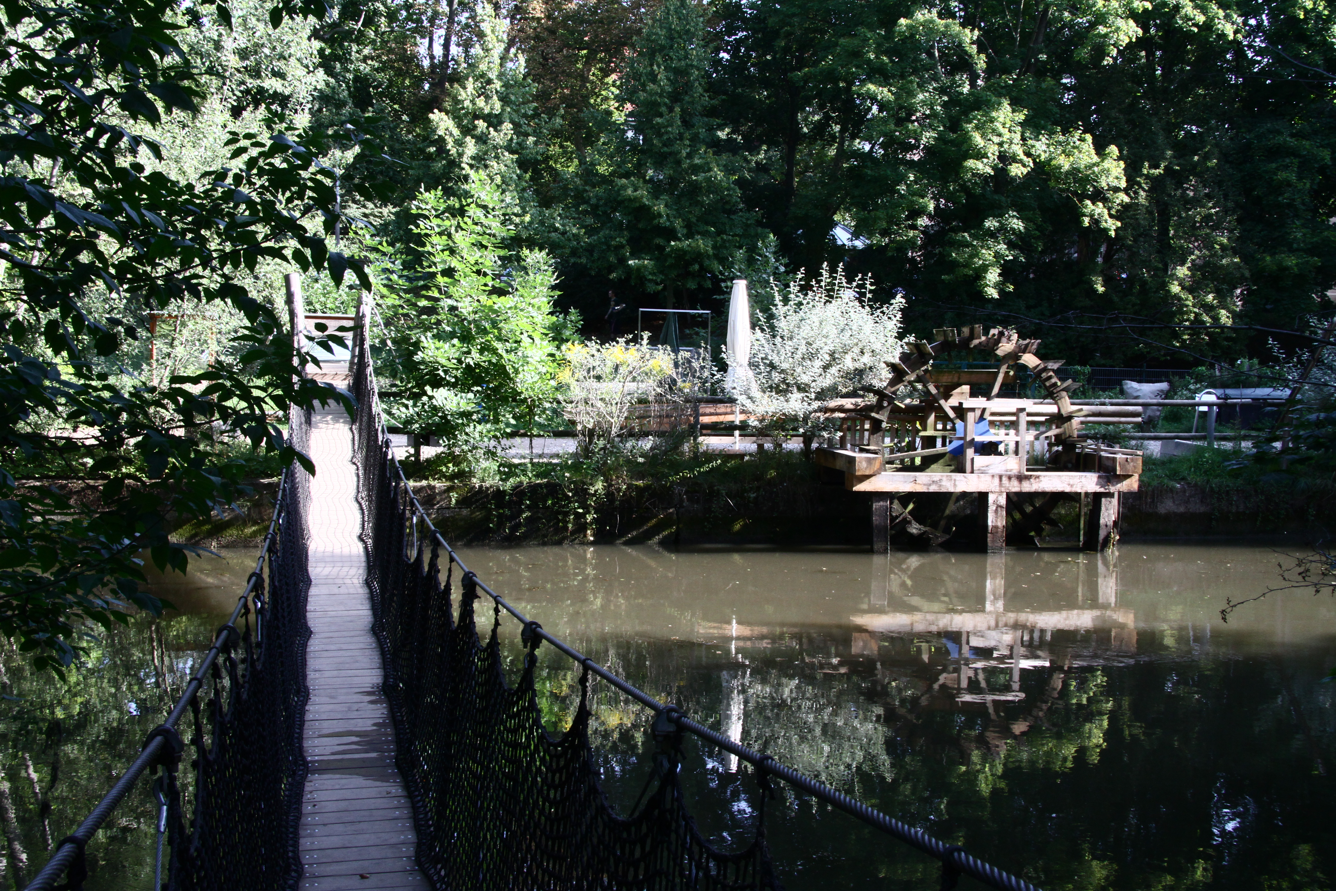 Ansicht auf das "Anderen Ufer" des Nürnberger Erfahrungsfeldes mit Seilbrücke über die Pegnitz und Wasserrad